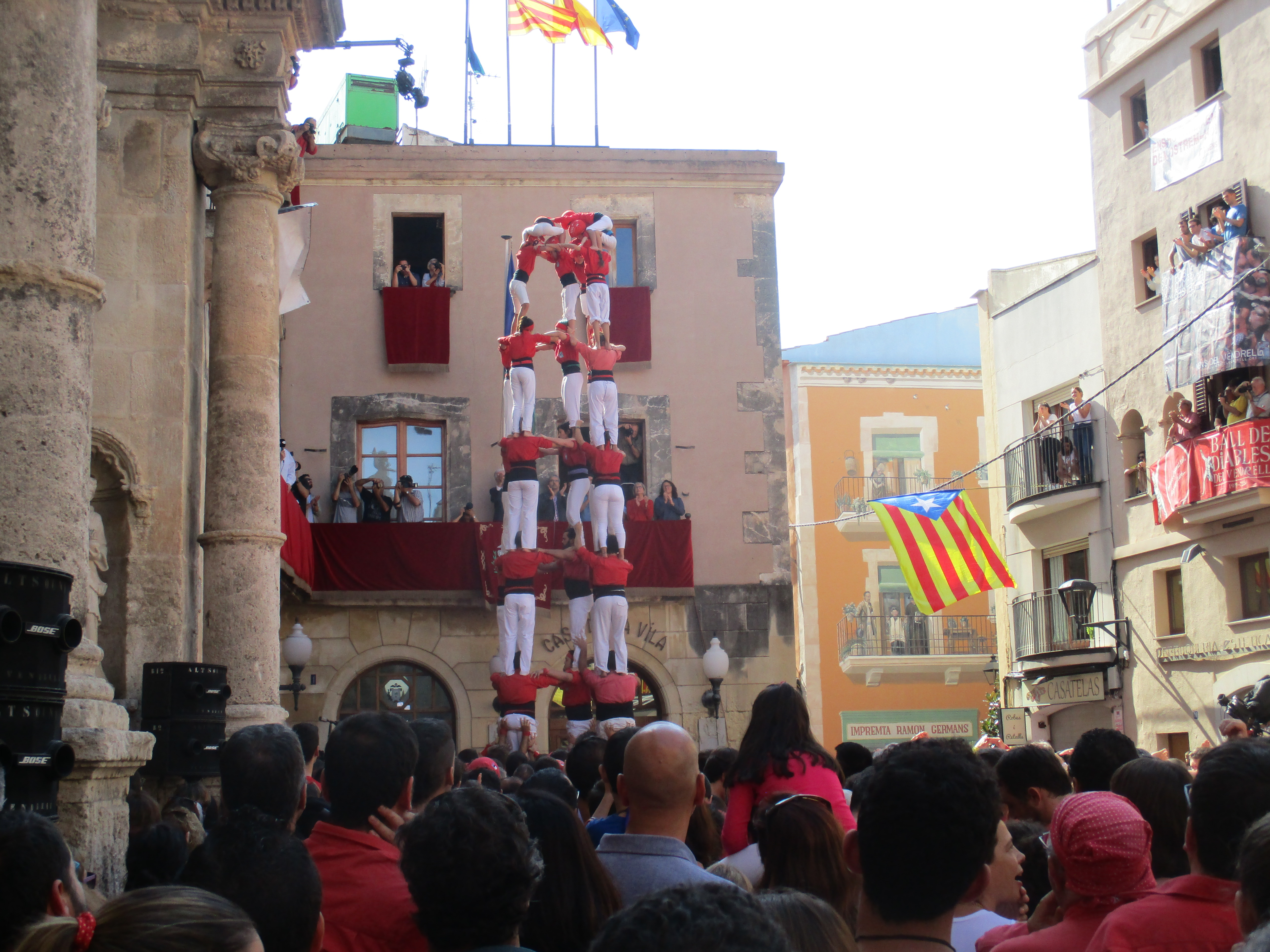 5de8 dels Nens Vendrell per la Fira de Santa Teresa del Vendrell del 2017